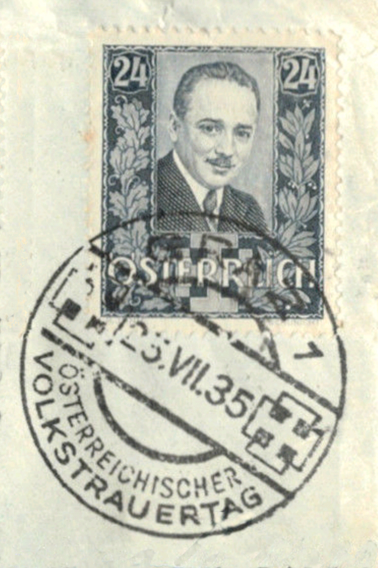 Gedenkmarke, Engelbert Dollfuß (* 4. Oktober 1892 in Texing; † 25. Juli 1934 in Wien) 24 Groschen, Mi589. Sonderstempel "Österreichischer Volkstrauertag 25. Juli 1935".